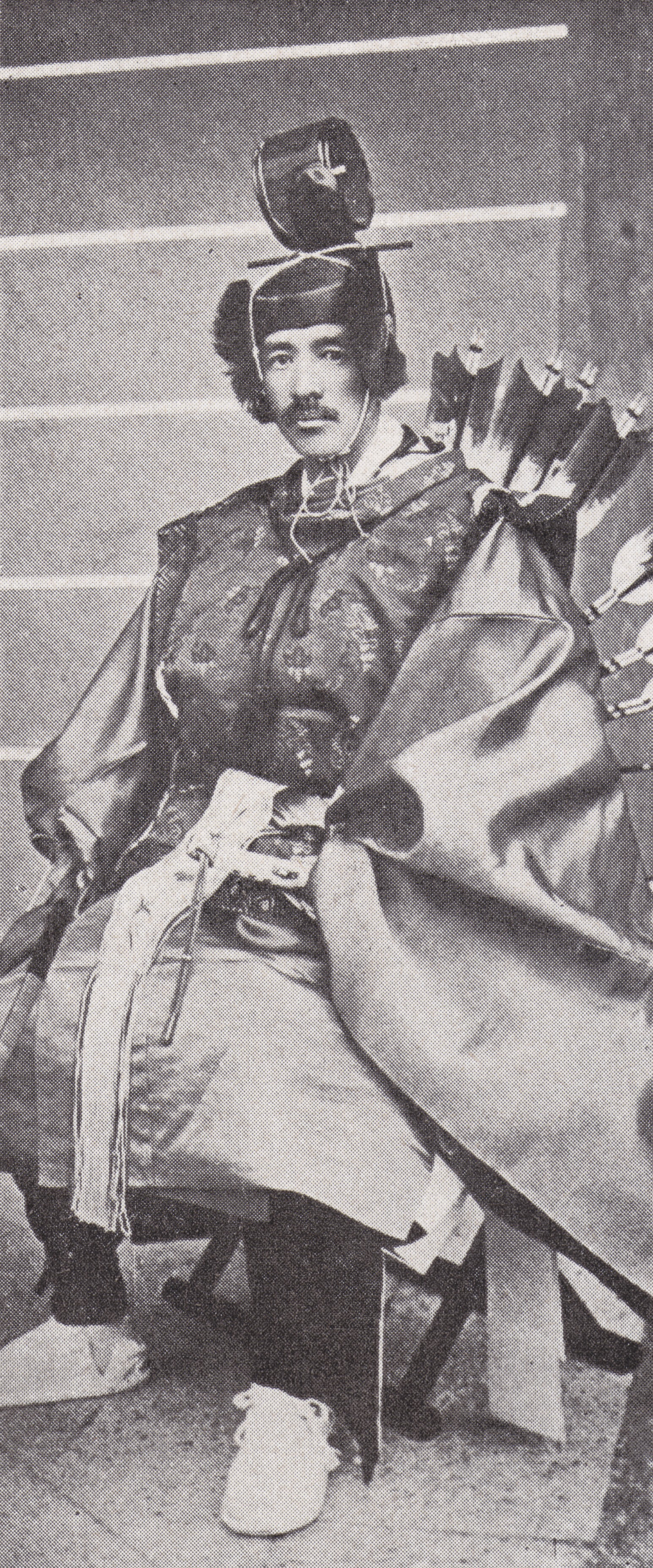 大礼使典儀官・男爵河辺博長